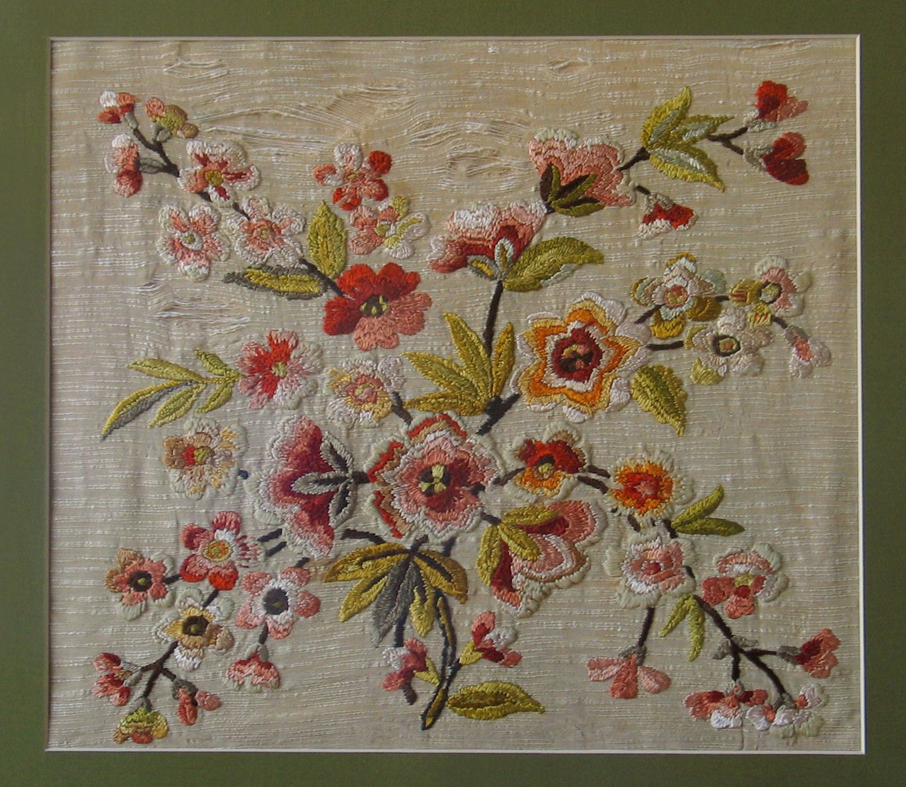 Silk shading